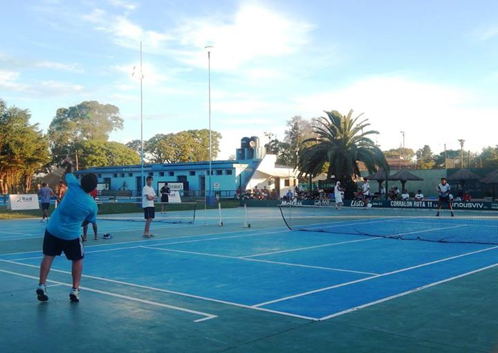 Argentino de San Carlos - Canchas de tenis criollo